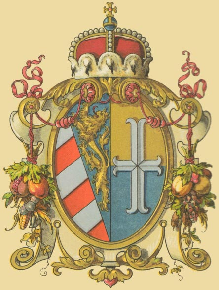 Emblema Contea di Gorizia e Gradisca di Hugo Gerard Ströhl